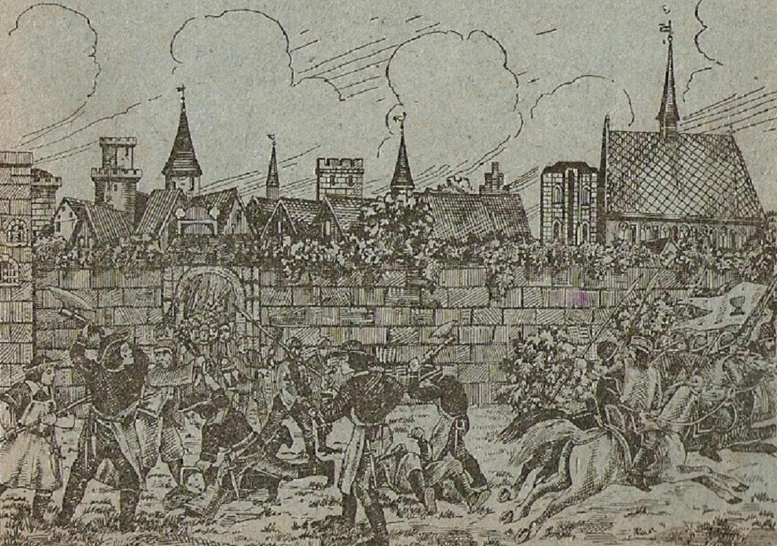 Husyci w Nysie - Brama Celna